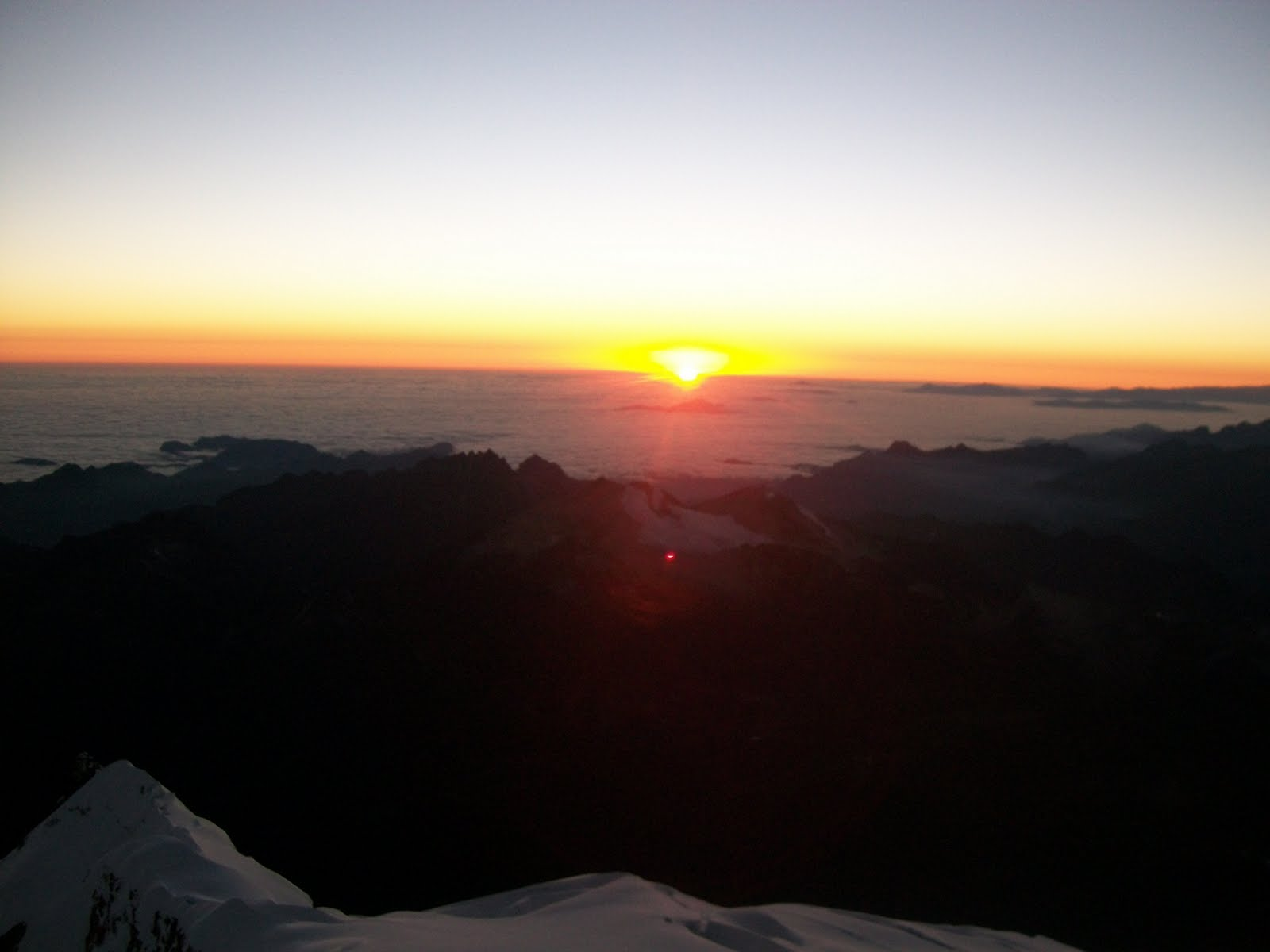 זריחה מעל העננים, מפיסגת הואיינה פוטוסי